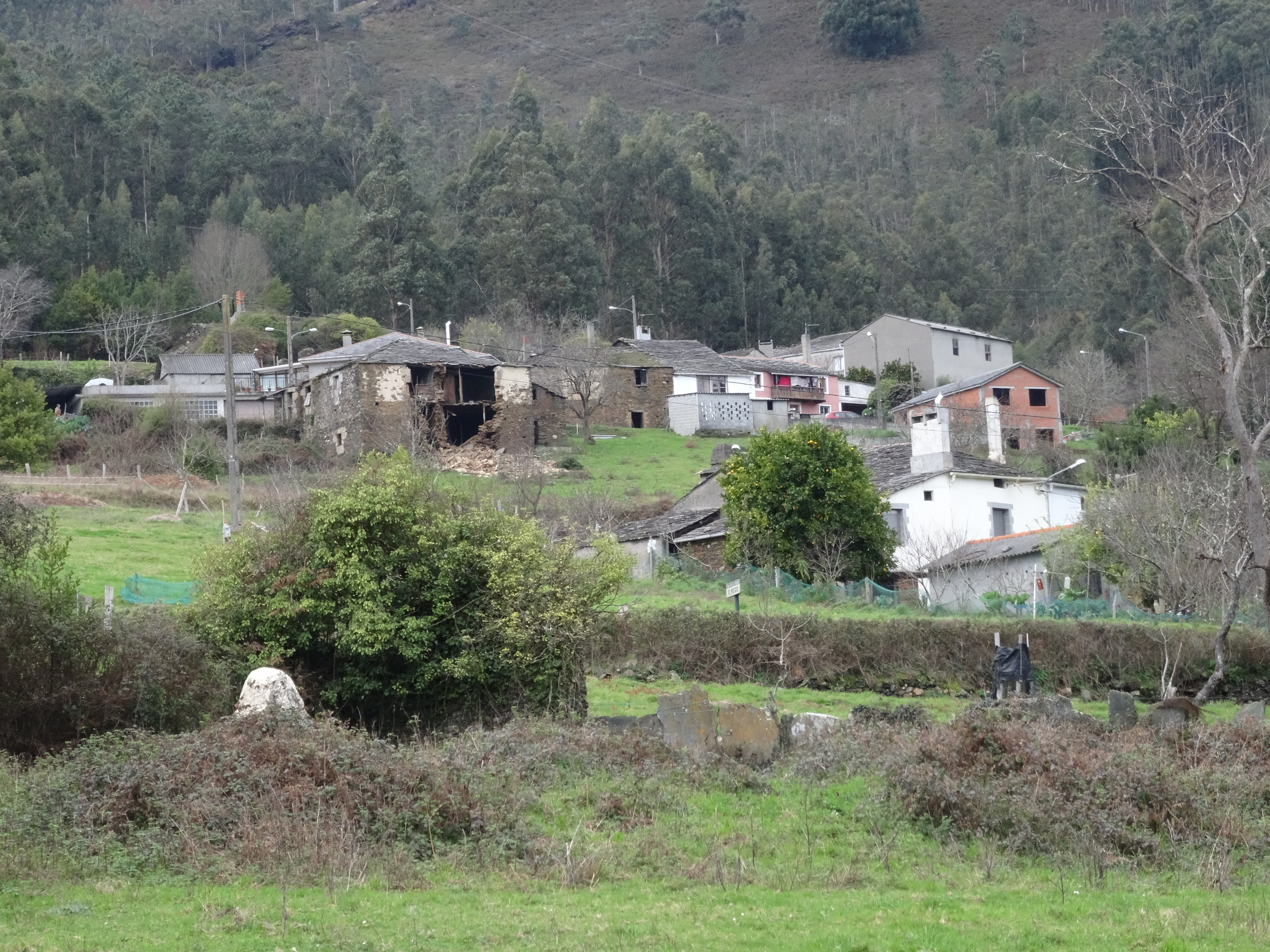 Ver título.